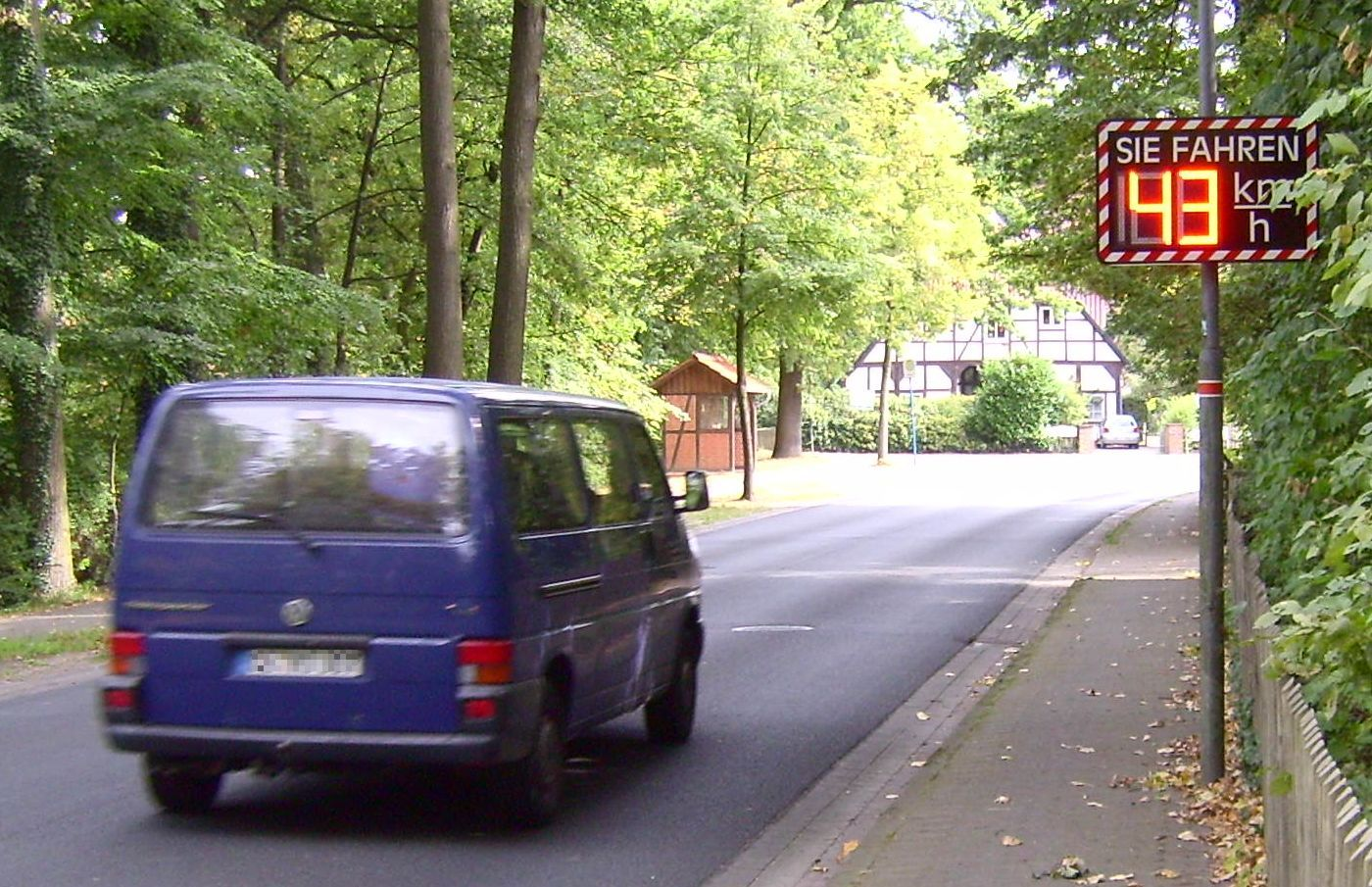 Geschwindigkeitsanzeigeanlage 43 km/h